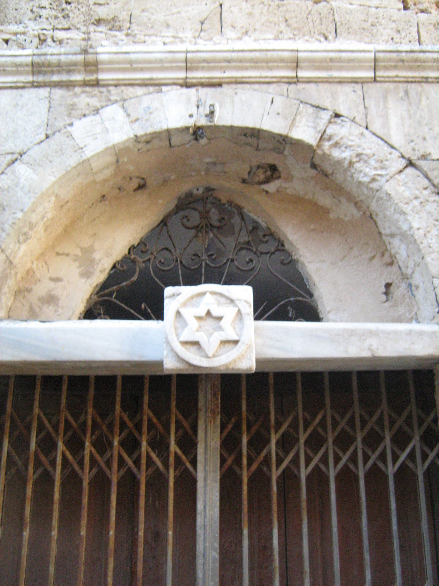 הכניסה לבית הכנסת של עולי לוב